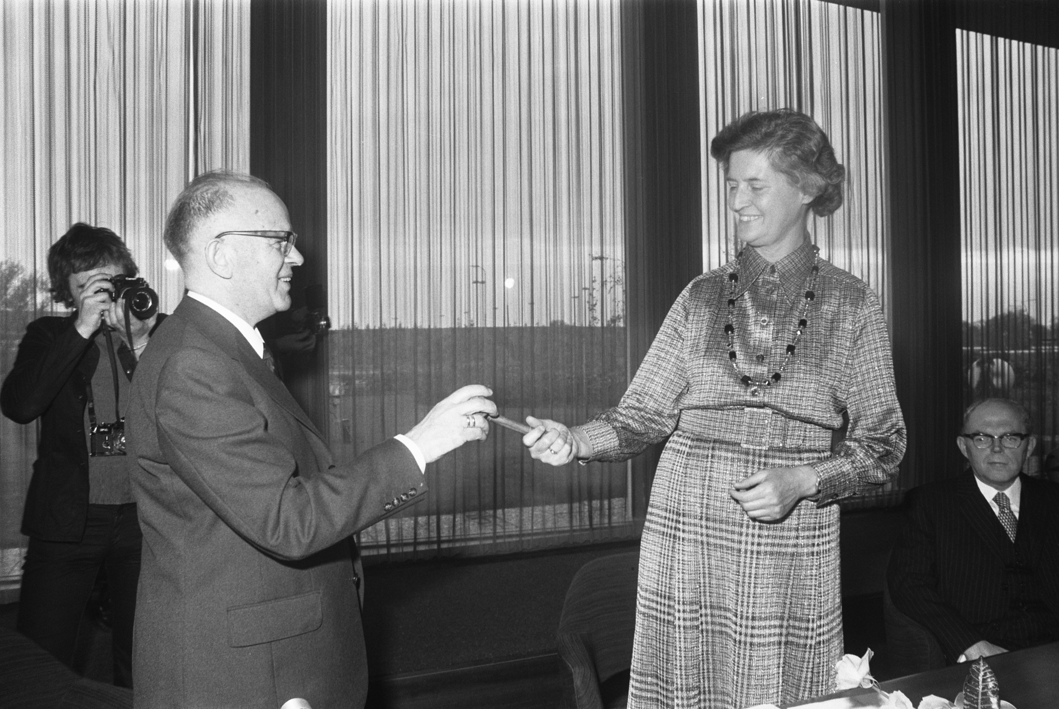 Collectie / Archief : Fotocollectie Anefo Reportage / Serie : [ onbekend ] Beschrijving : Mej. mr. A. Schilthuis , nieuwe Comm. der Kon. in Drenthe in Provinciehuis in Assen geinstalleerd; G. Londo overhandigt voorzittershamer aan mej. Schilthuis / Datum : 4 november 1974 Locatie : Assen Trefwoorden : installaties Persoonsnaam : G. Londo Fotograaf : Croes, Rob C. / Anefo Auteursrechthebbende : Nationaal Archief Materiaalsoort : Negatief (zwart/wit) Nummer archiefinventaris : bekijk toegang 2.24.01.05 Bestanddeelnummer : 927-5594